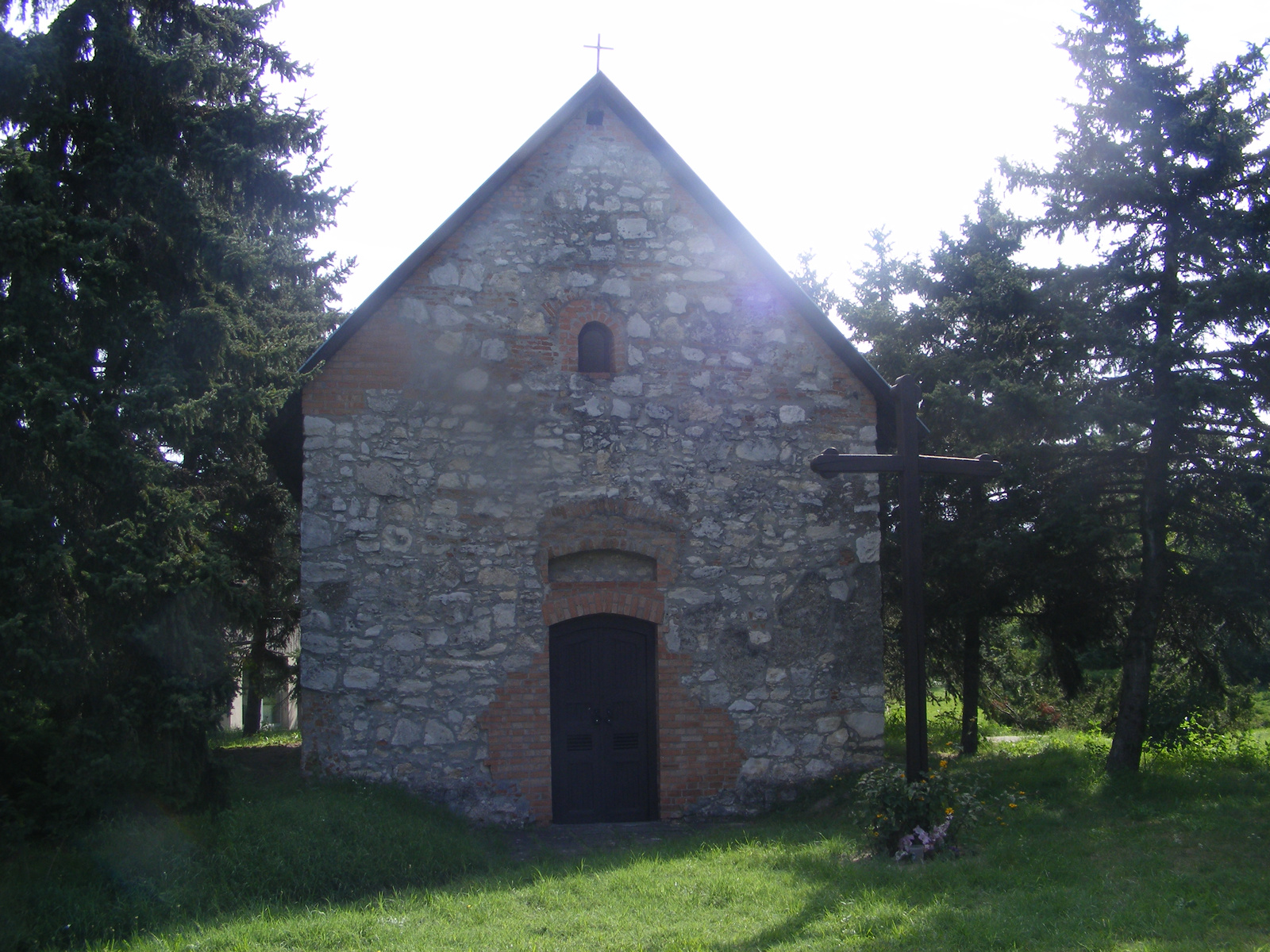 Szent Anna-kápolna (Tököl, Ráckevei út mentén) This is a photo of a monument in Hungary. Identifier: 7465